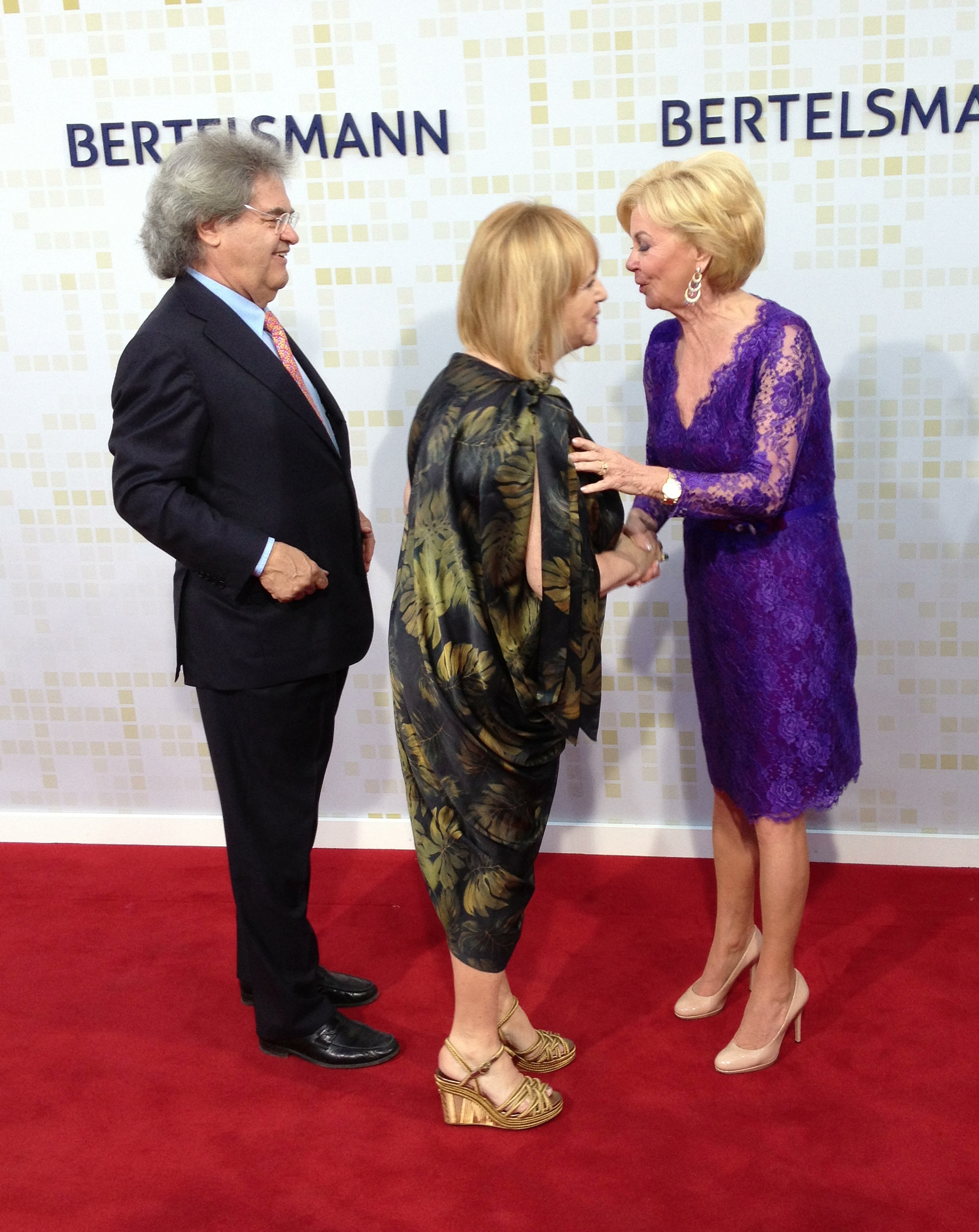 Foto von der Bertelsmann Party 2013